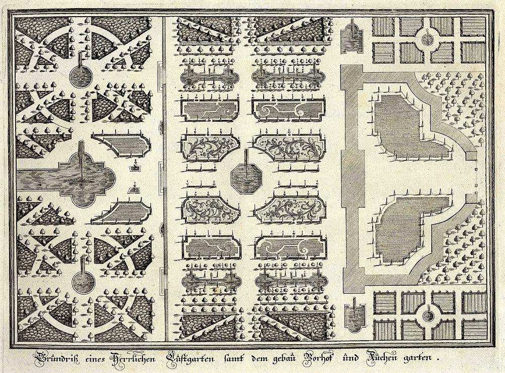 Entwurf eines Lustgartens. Aus: Erlustierende Augenweide in Vorstellung herrlicher Garten und Lustgebäude. Kupferstichwerk; Augsburg, Wolff, um 1717.